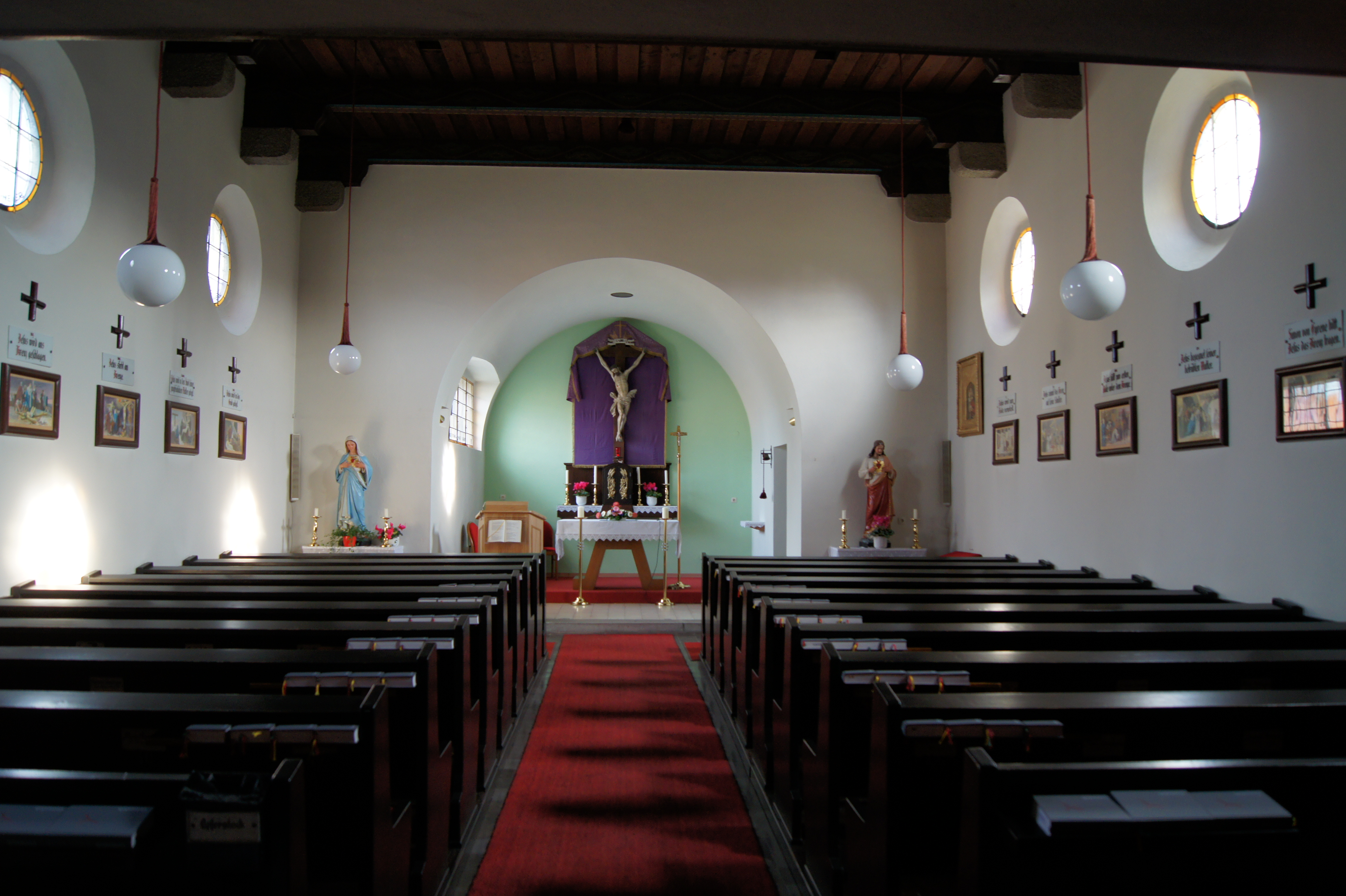 Kath. Filialkirche Zum guten Hirten